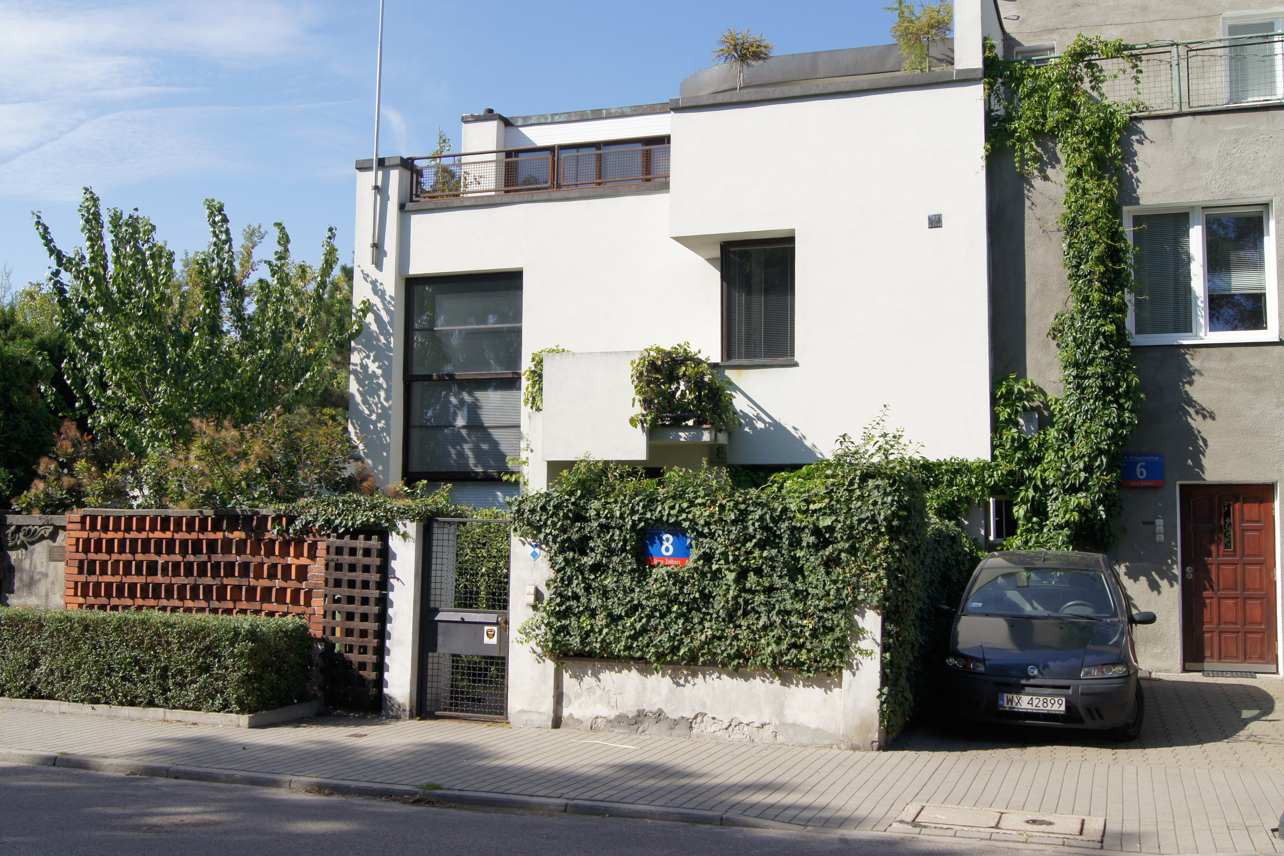 willa, ul. Niegolewskiego 8, Warszawa, dz. Żoliborz